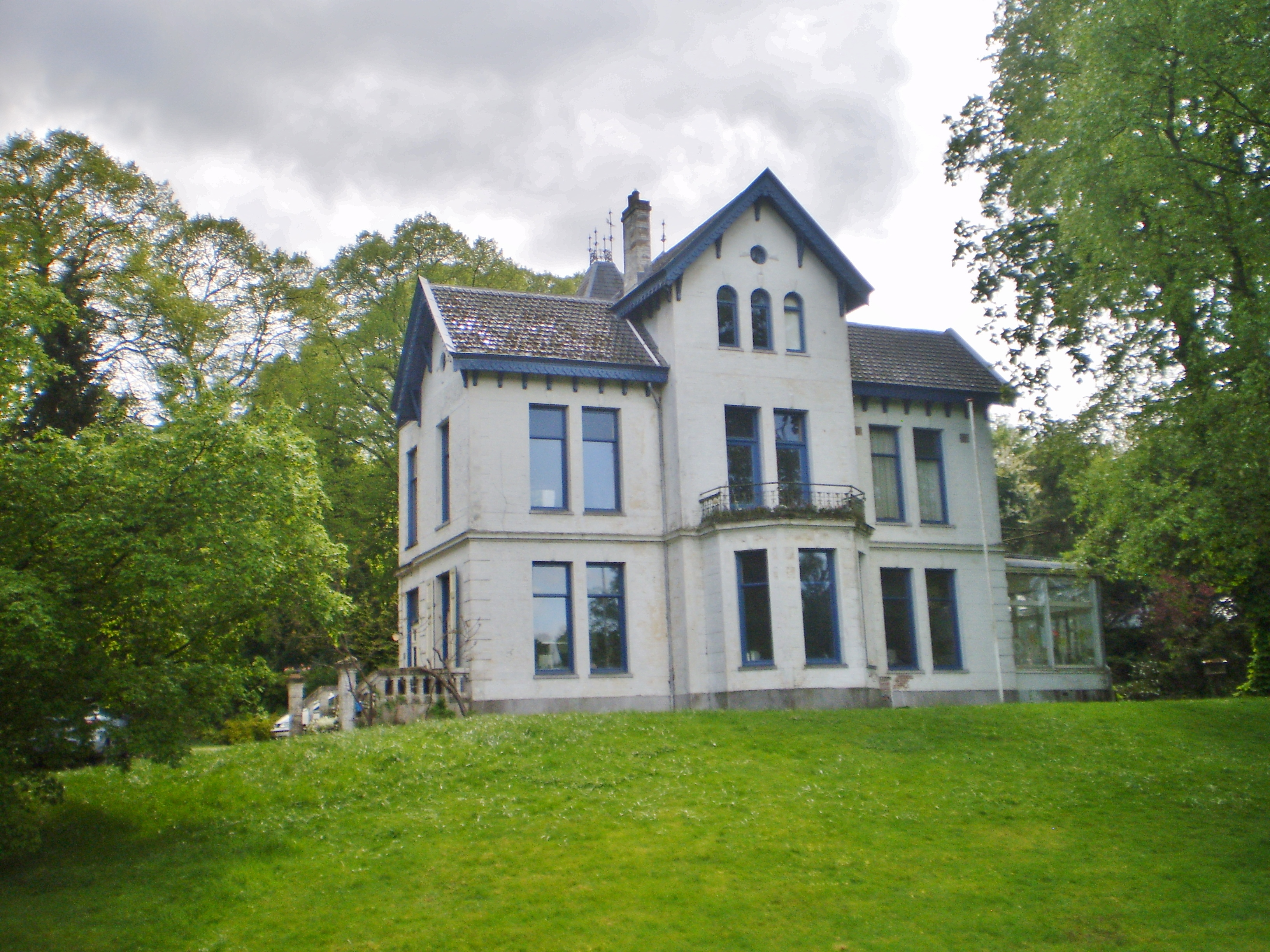 De villa staat al enige tijd leeg